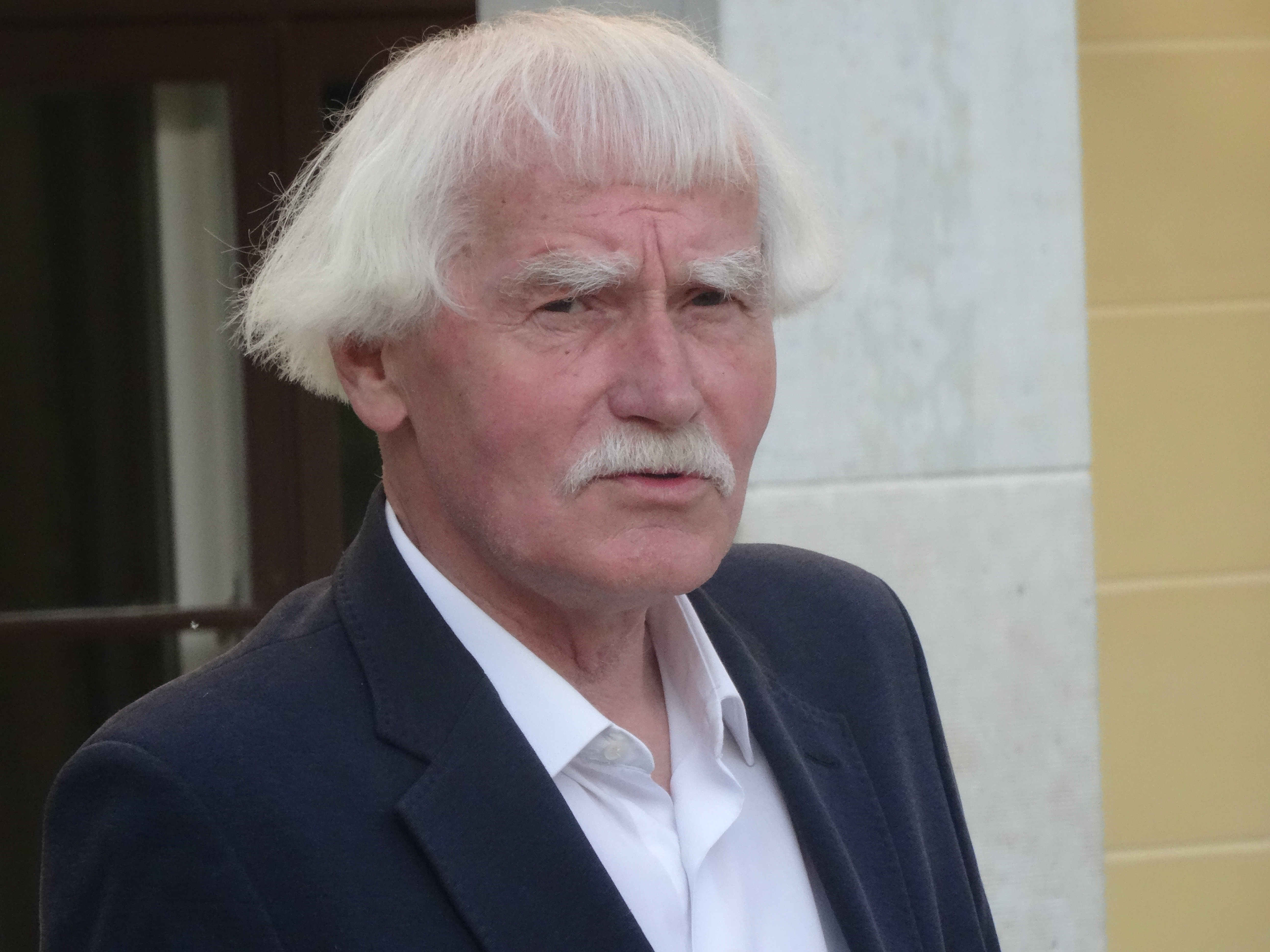 Jüri Kuuskemaa kõnet pidamas Vana-Vigala mõisa ees (juuli 2017)